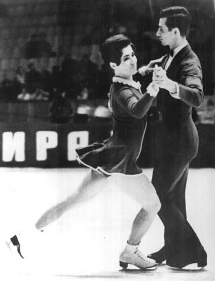 Ludmilla Pachomowa, Alexander Gorschkow PI-TASS-19.12.69 Moskauf: Internationales Eiskunstlaufen. Im Eistanz führen nach zwei Pflichttänzen am 18.12.69 erwartungsgemäß die Vizeweltmeister Ludmilla Pachomowa-Alexander Gorschkow (UdSSR).